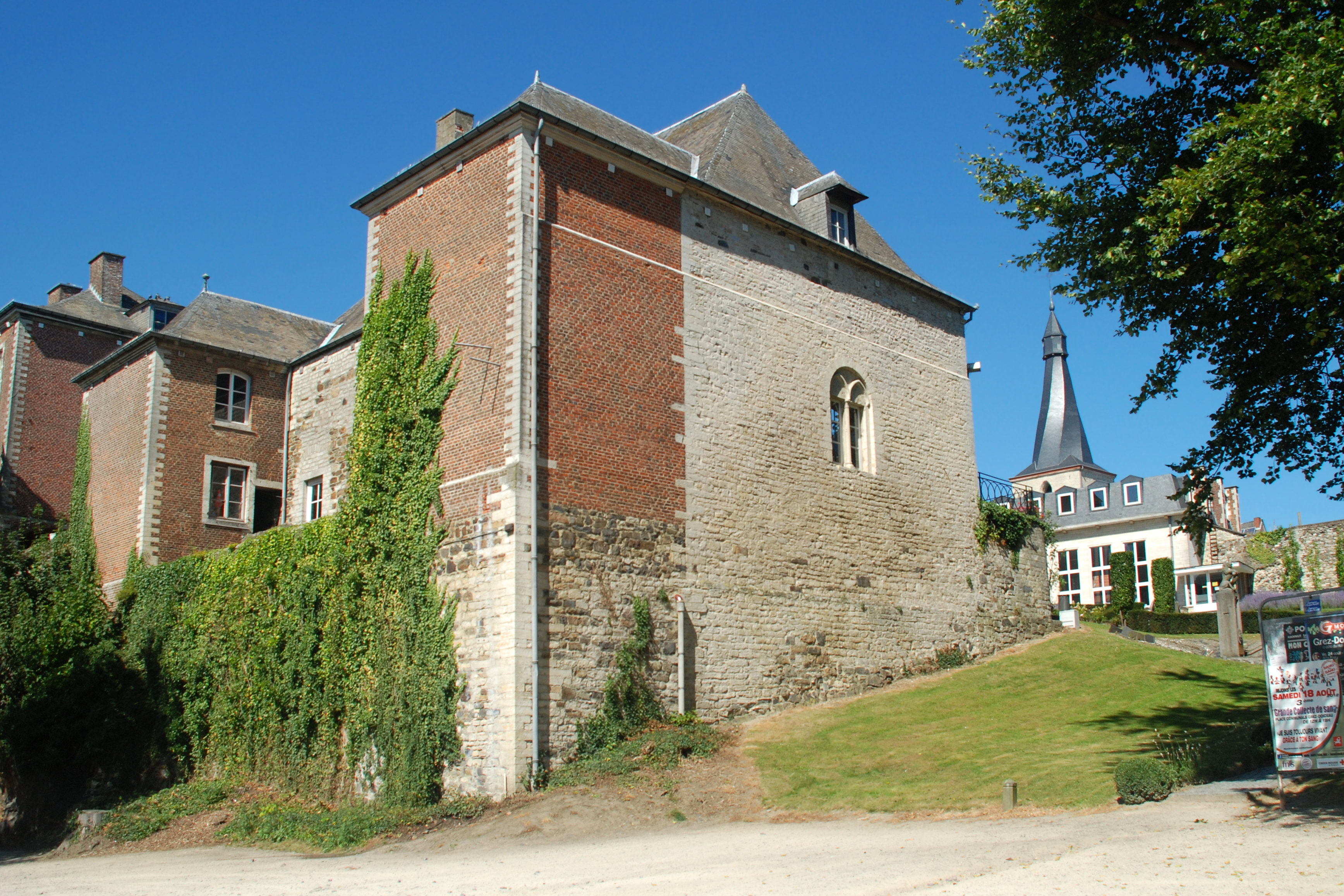 Belgique - Brabant wallon - Jodoigne - Château Pastur